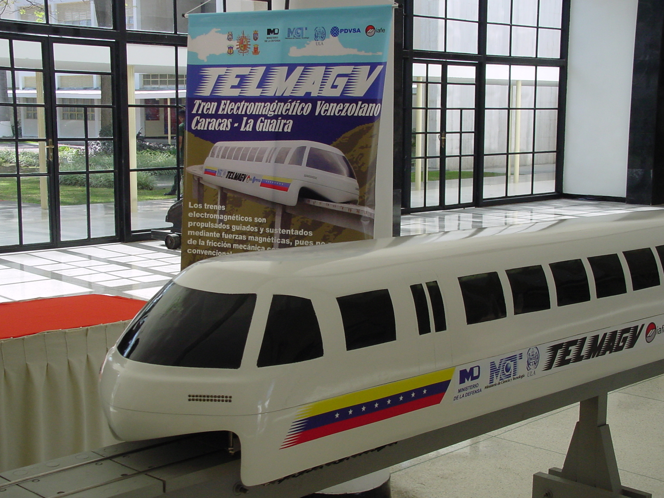 Prototipo 7 del TELMAGV